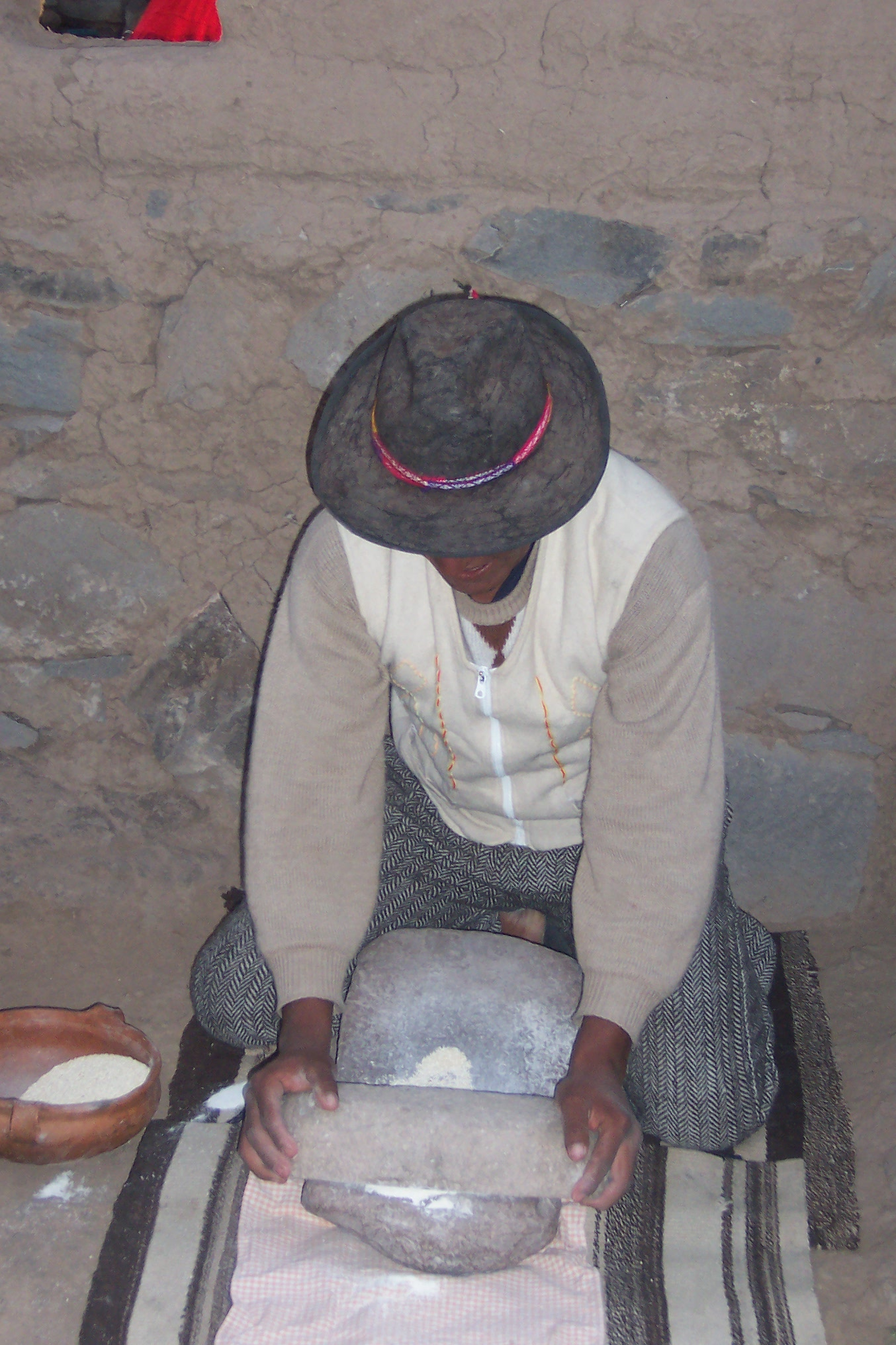 Hatuncolla, pueblo de población Quechua, a 34 km de Puno y a unos 3 km de Sillustani. Altiplano peruano. 3.850 m s.n.m. Campecino demostrando molienda de granos. Autor: Alfredobi Fecha: Agosto 2006